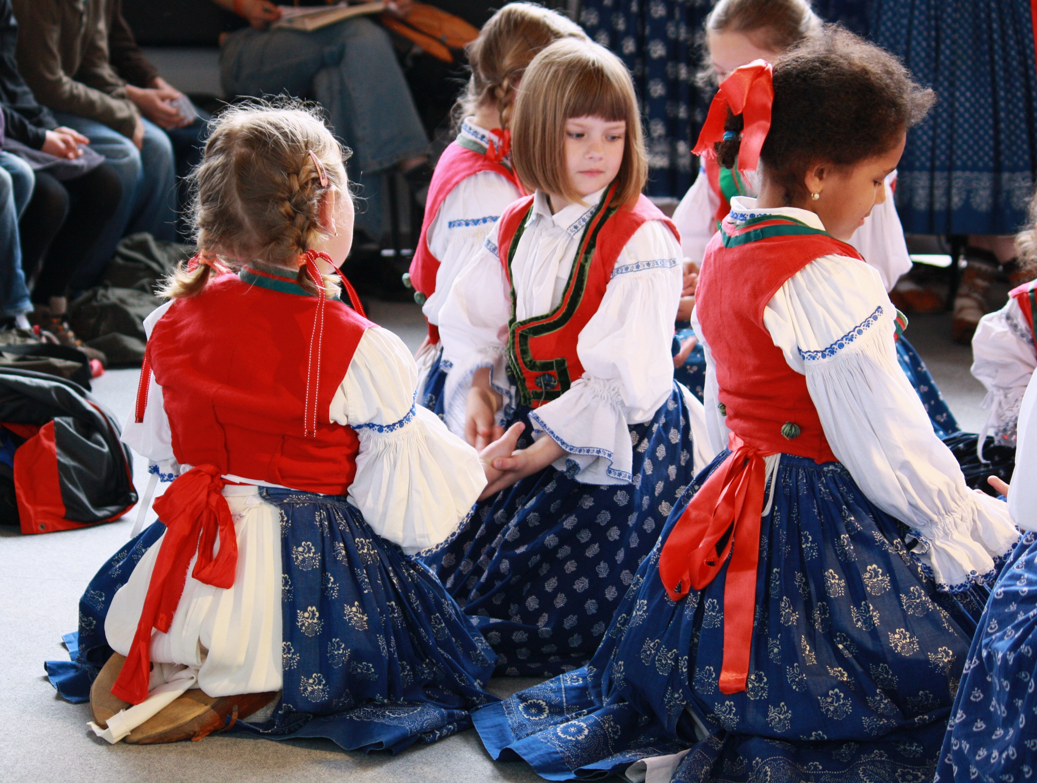 Svět knihy 2010 - dětský folklórní soubor This photograph was taken with a DSLR from WMCZ's Camera grant. Personality rights warning Although this work is freely licensed or in the public domain, the person(s) shown may have rights that legally restrict certain re-uses unless those depicted consent to such uses. In these cases, a model release or other evidence of consent could protect you from infringement claims.